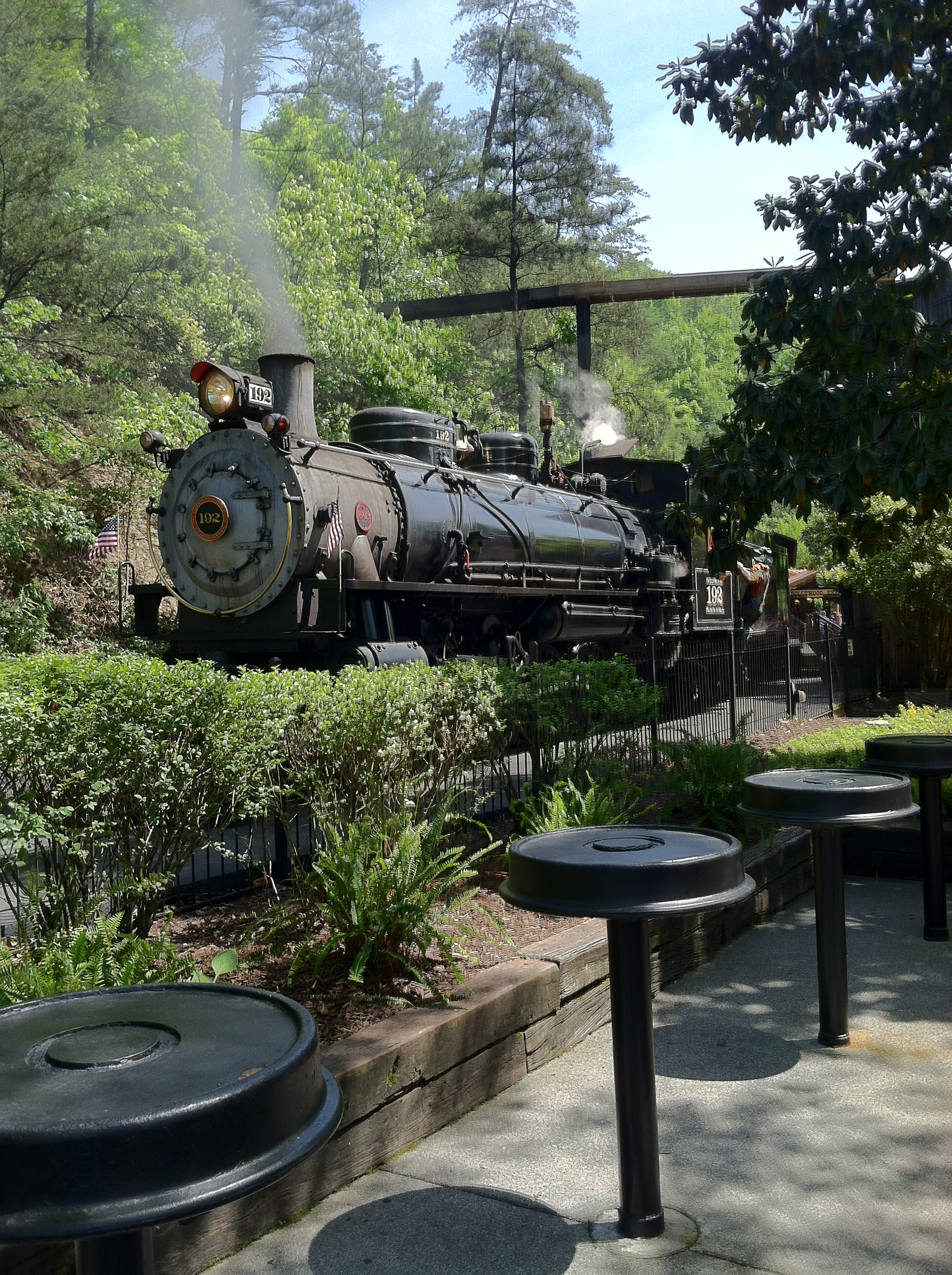 Engine #192 Klondike Katie